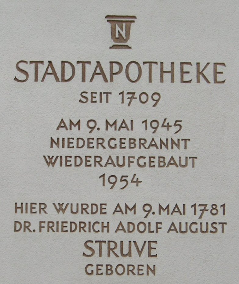 Detail am Haus der Stadtapotheke in Neustadt